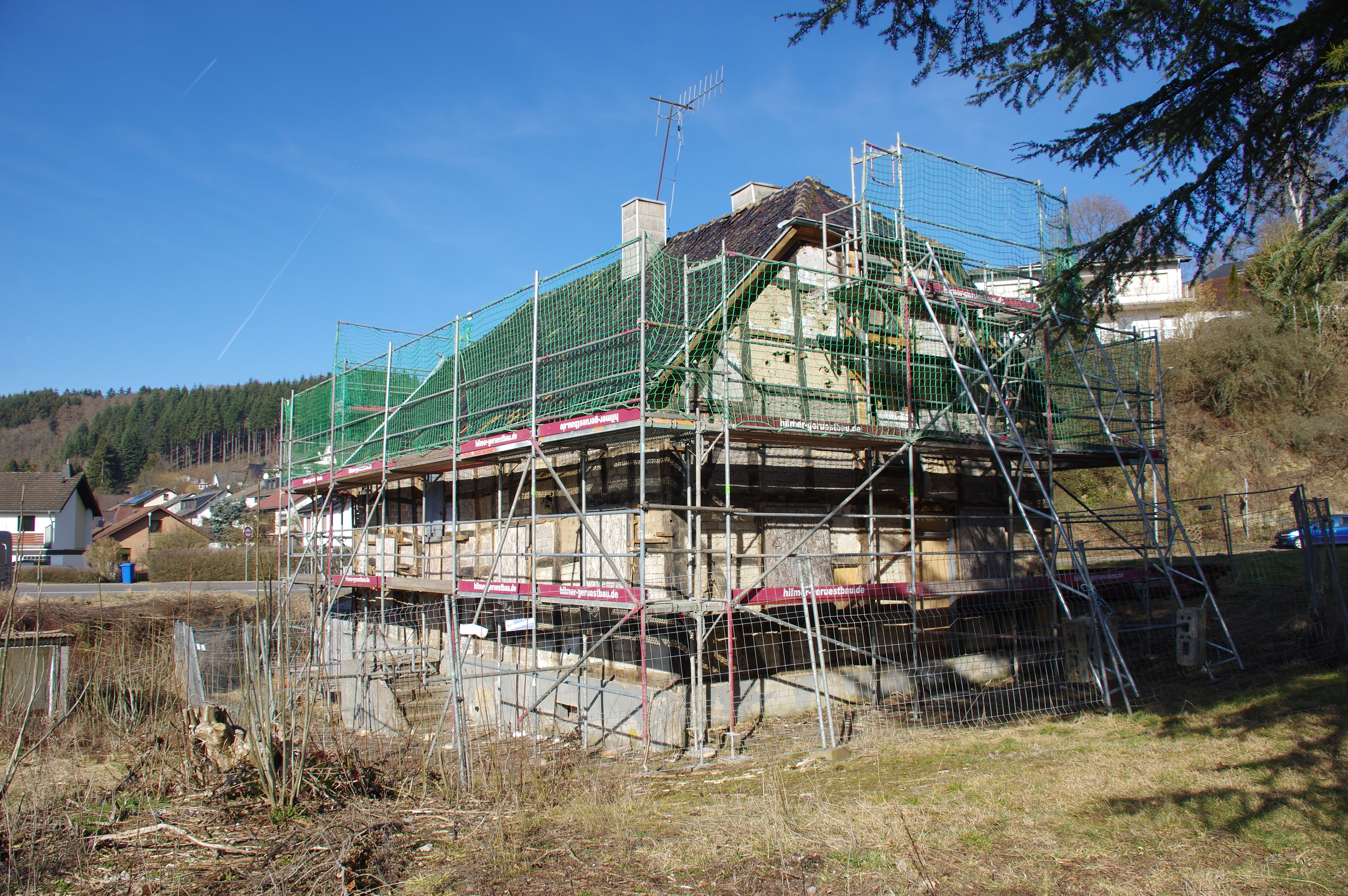 Hellenthal, Gerberei Kremer, Abbruch